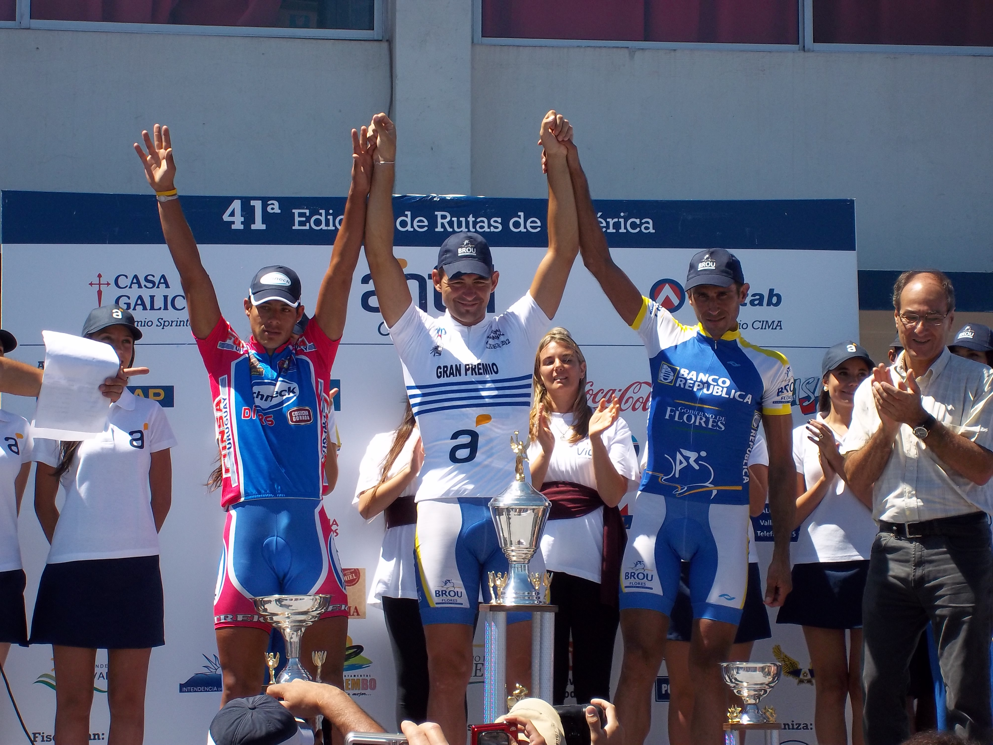 Podio final de Rutas de América 2012. De izquierda a derecha: Alan Presa (2º), Jorge Soto (1º) y Matías Médici (3º)